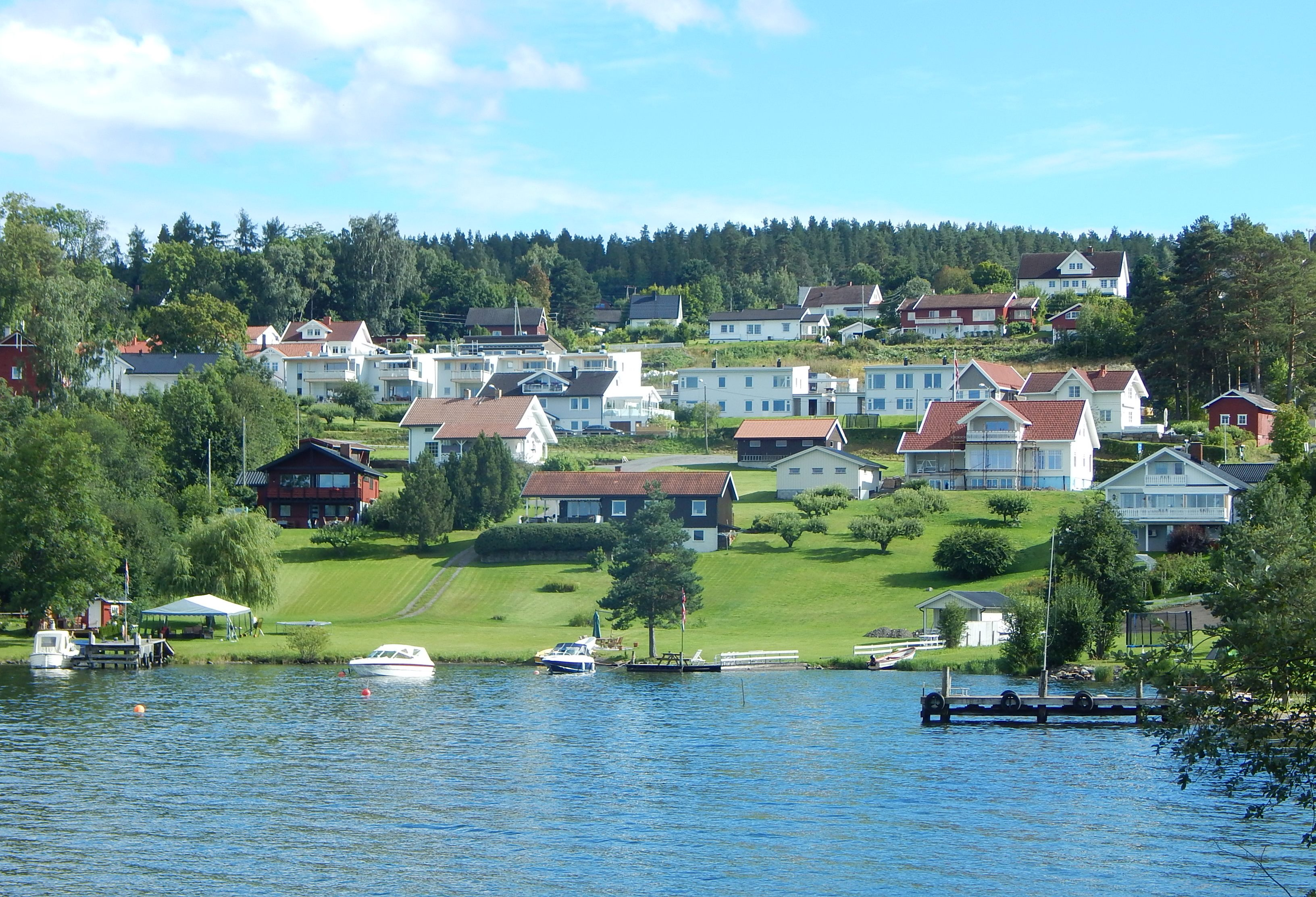 Kapp i Østre Toten